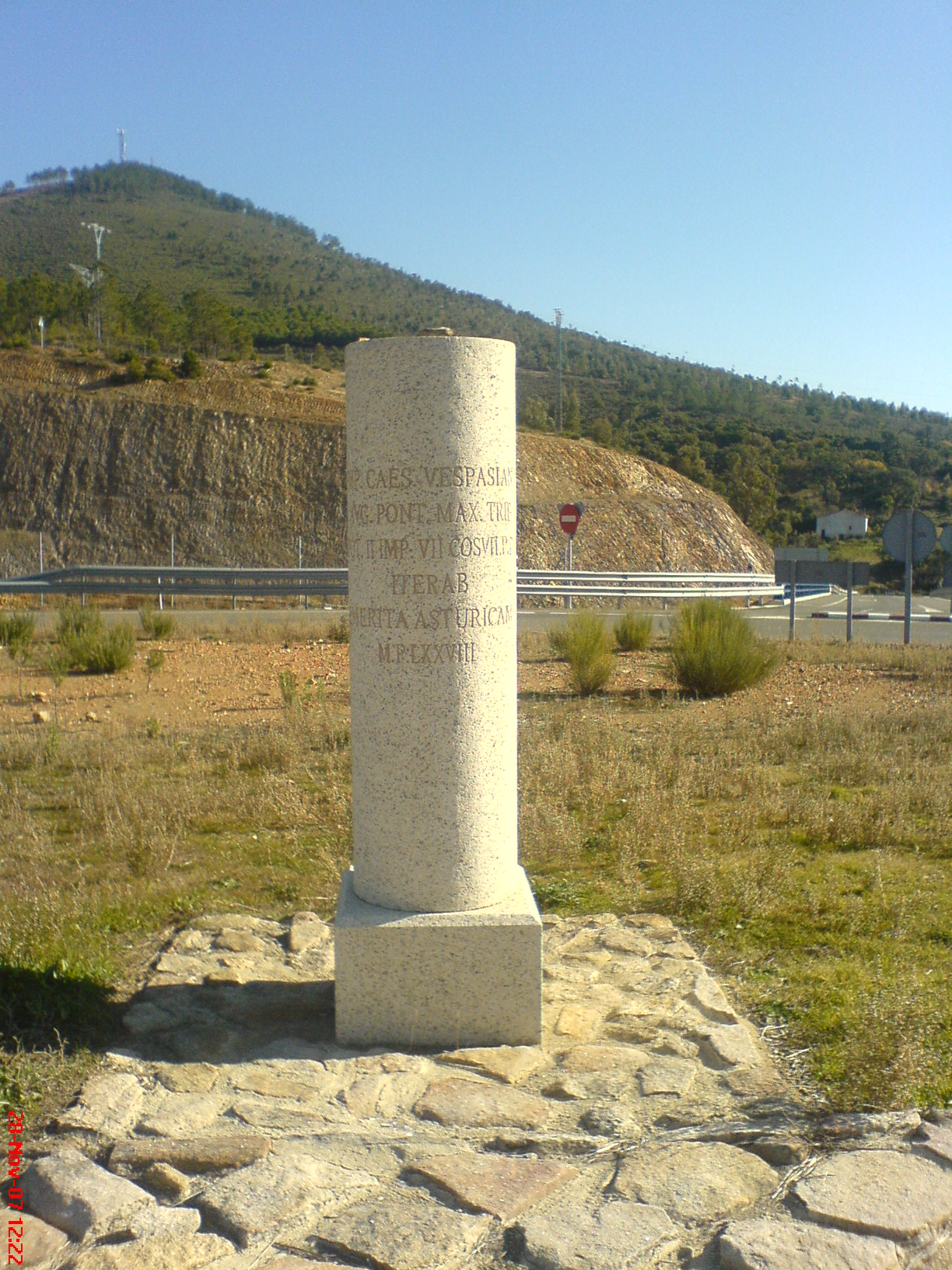 Anverso del hito de granito conmemorativo Vía de la Plata en el Puerto de los Castaños. Cáceres.